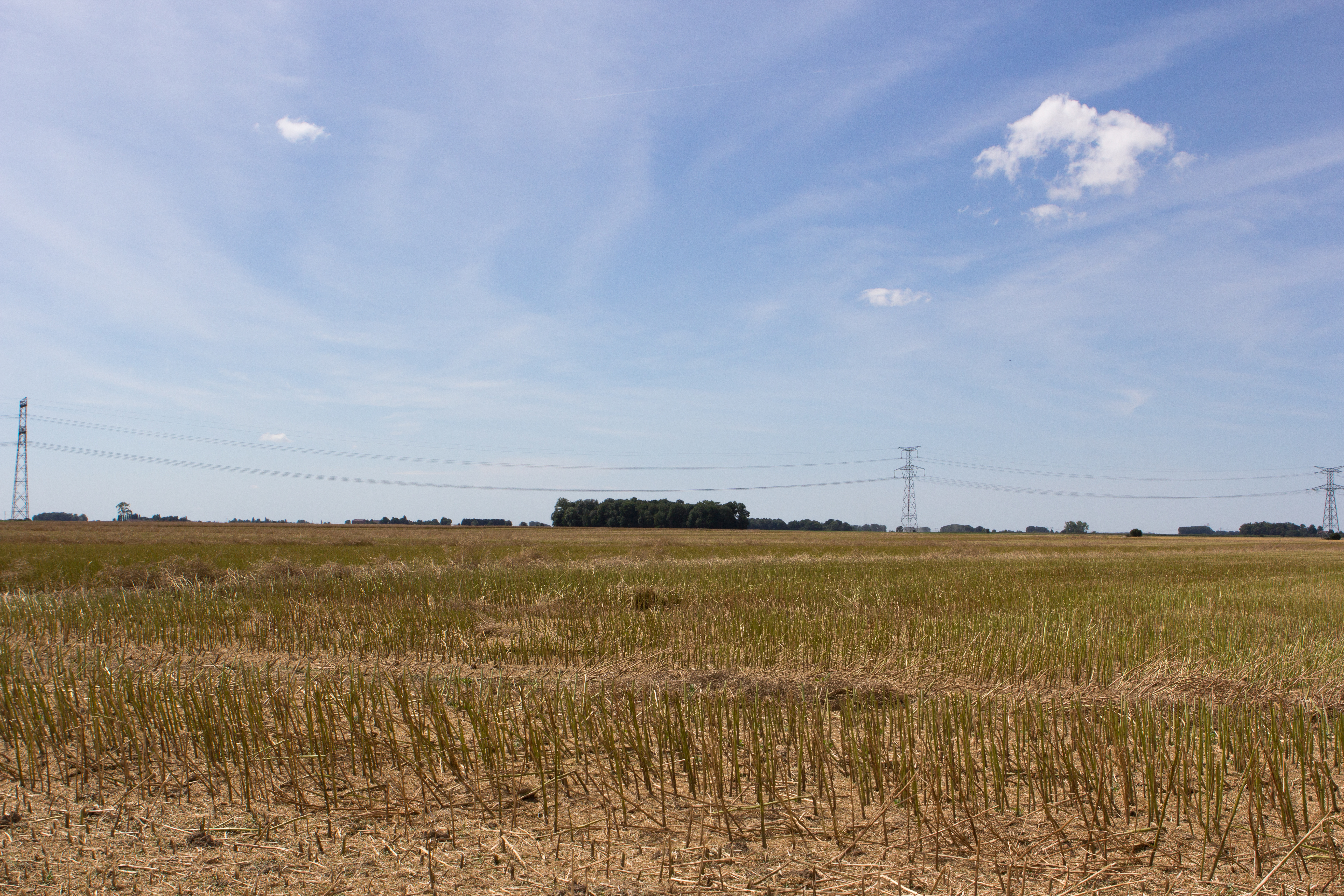 Vues de Guignes / Guignes, Seine-et-Marne, France